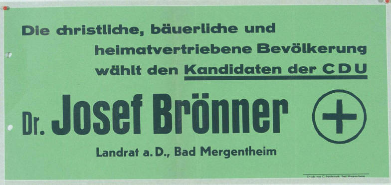 Die christliche, bäuerliche und heimatvertriebene Bevölkerung wählt den Kandidaten der CDU Dr. Josef Brönner Landrat a.D., Bad Mergentheim Kommentar: Ausführungen auf gelbem und grünem Papier Plakatart: Kandidaten-/Personenplakat ohne Porträt Drucker_Druckart_Druckort: C. Schönhuth, Bad Mergentheim Objekt-Signatur: 10-001: 171 Bestand: Plakate zu Bundestagswahlen (10-001) GliederungBestand10-18: Plakate zu Bundestagswahlen (10-001) » Die 1. Bundestagswahl am 14. August 1949 » CDU » Ohne Porträtfoto Lizenz: KAS/ACDP 10-001: 171 CC-BY-SA 3.0 DE